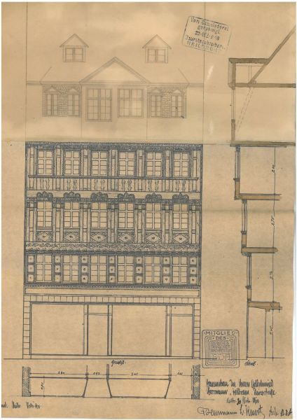 Zeichnung aus dem Baugesuch zur Umgestaltung der Fassade des Hauses Kaiserstr. 17 in Heilbronn, Stadtarchiv Sign. A034-2851